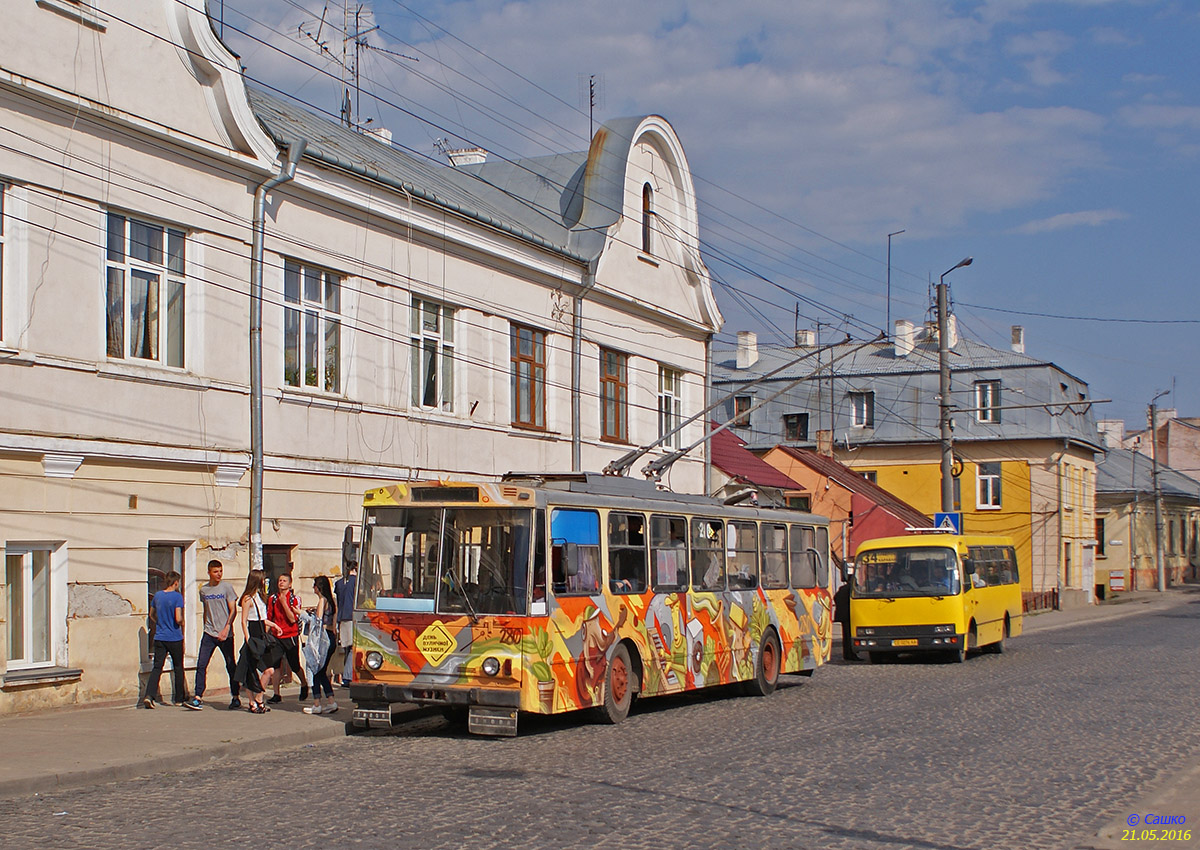 Škoda 14Tr02/6 №280 в Чернівцях на вулиці Сагайдачного, в якості музичного